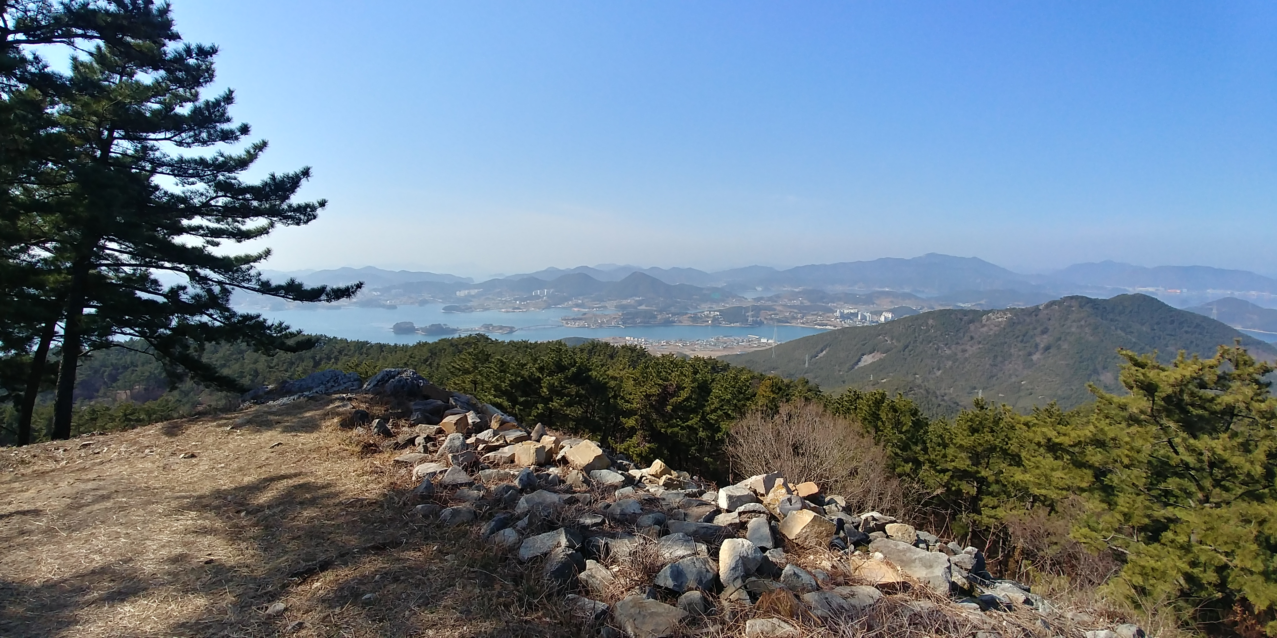 전망대에서 본 통영 쪽 뷰 파노라마